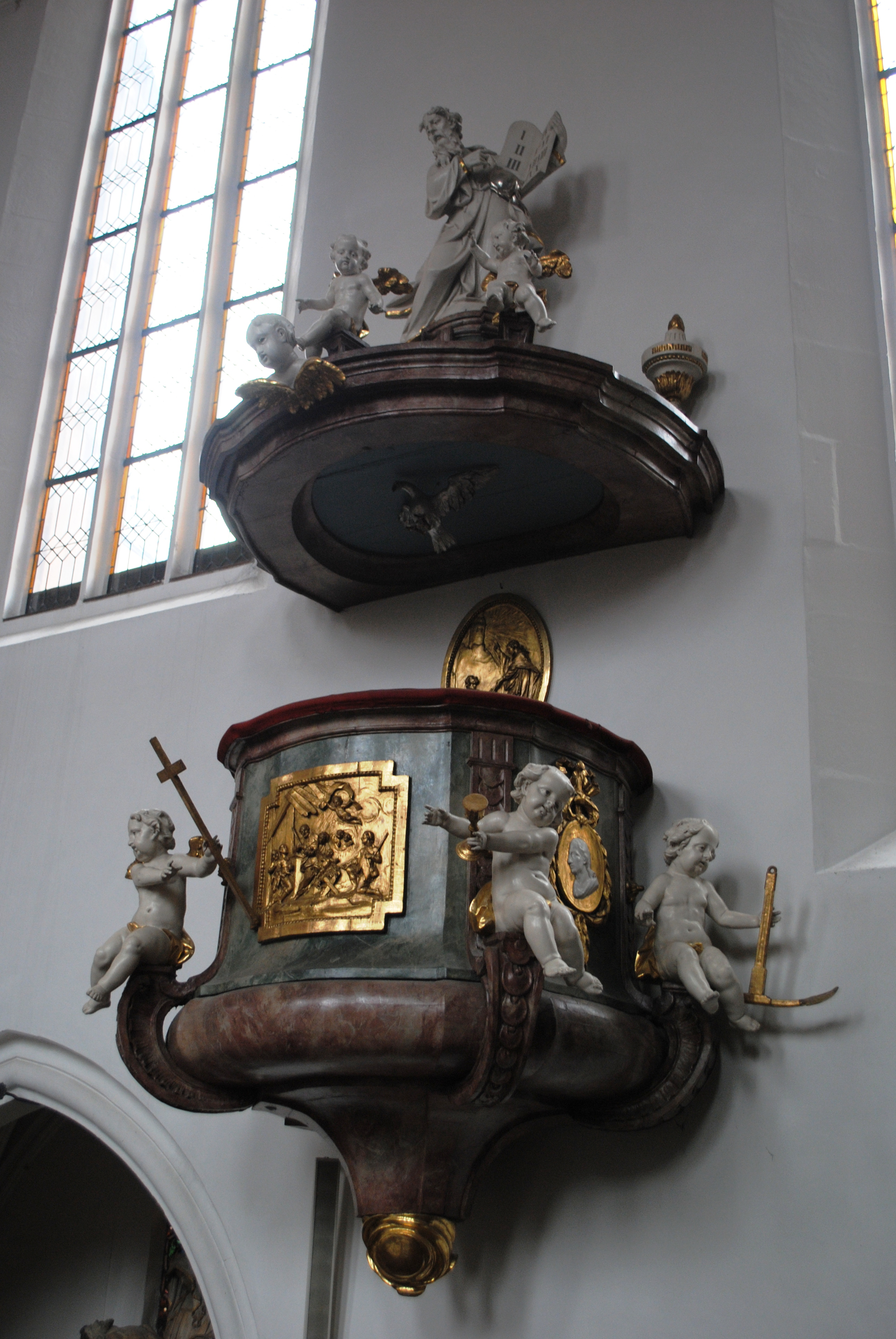 Kanzel, St. Bartholomäus, Volkach, 1792.